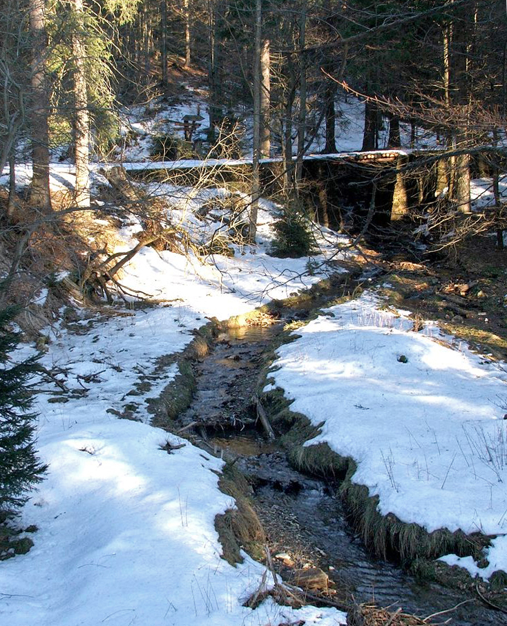 Żródła rzeki Morawki (dopływ Białej Lądeckiej, Dolny Ślask)